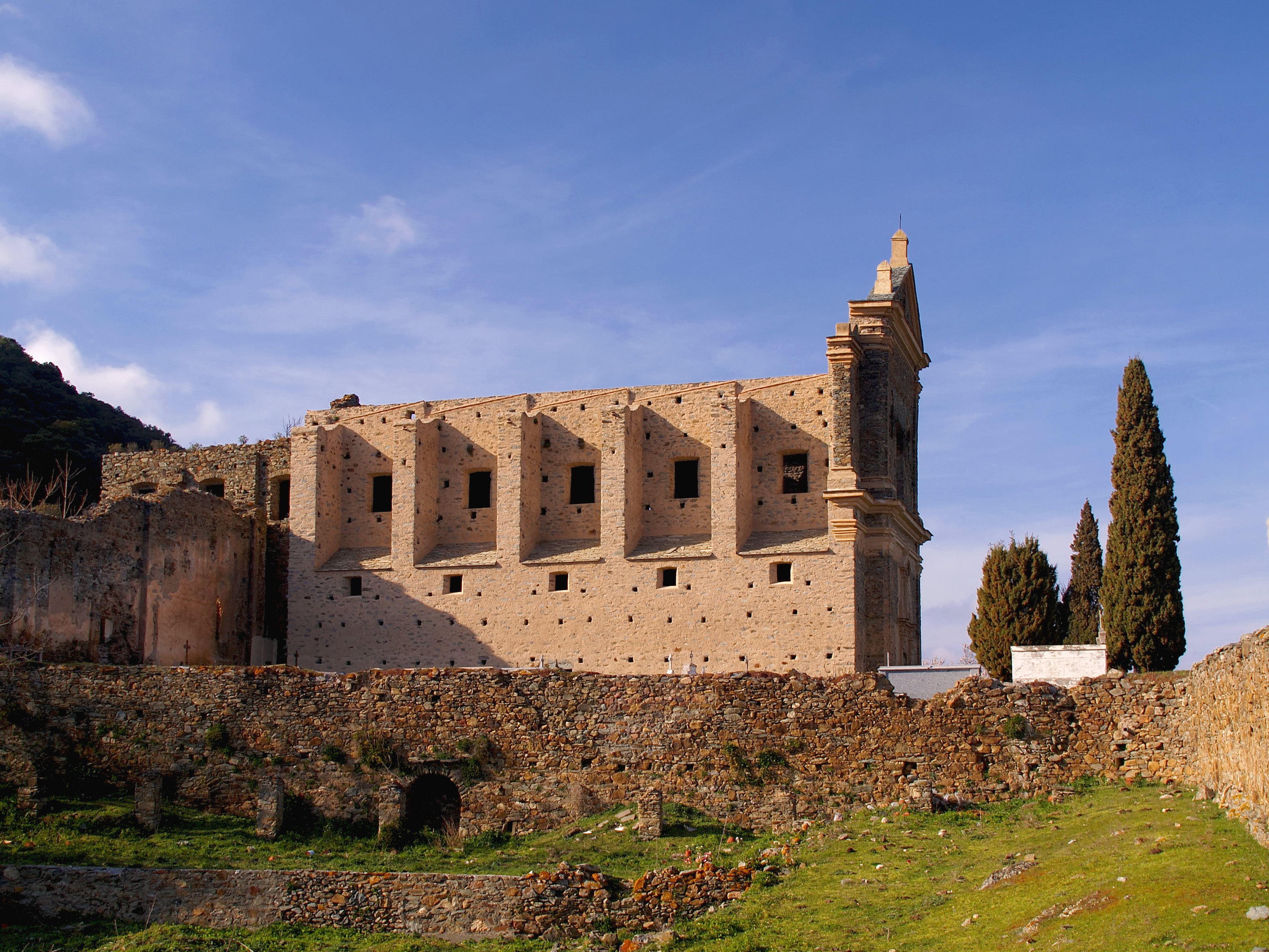 Castifao - Ancien couvent Saint-François